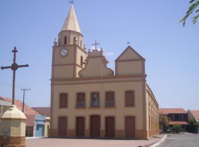 Igreja da Matriz